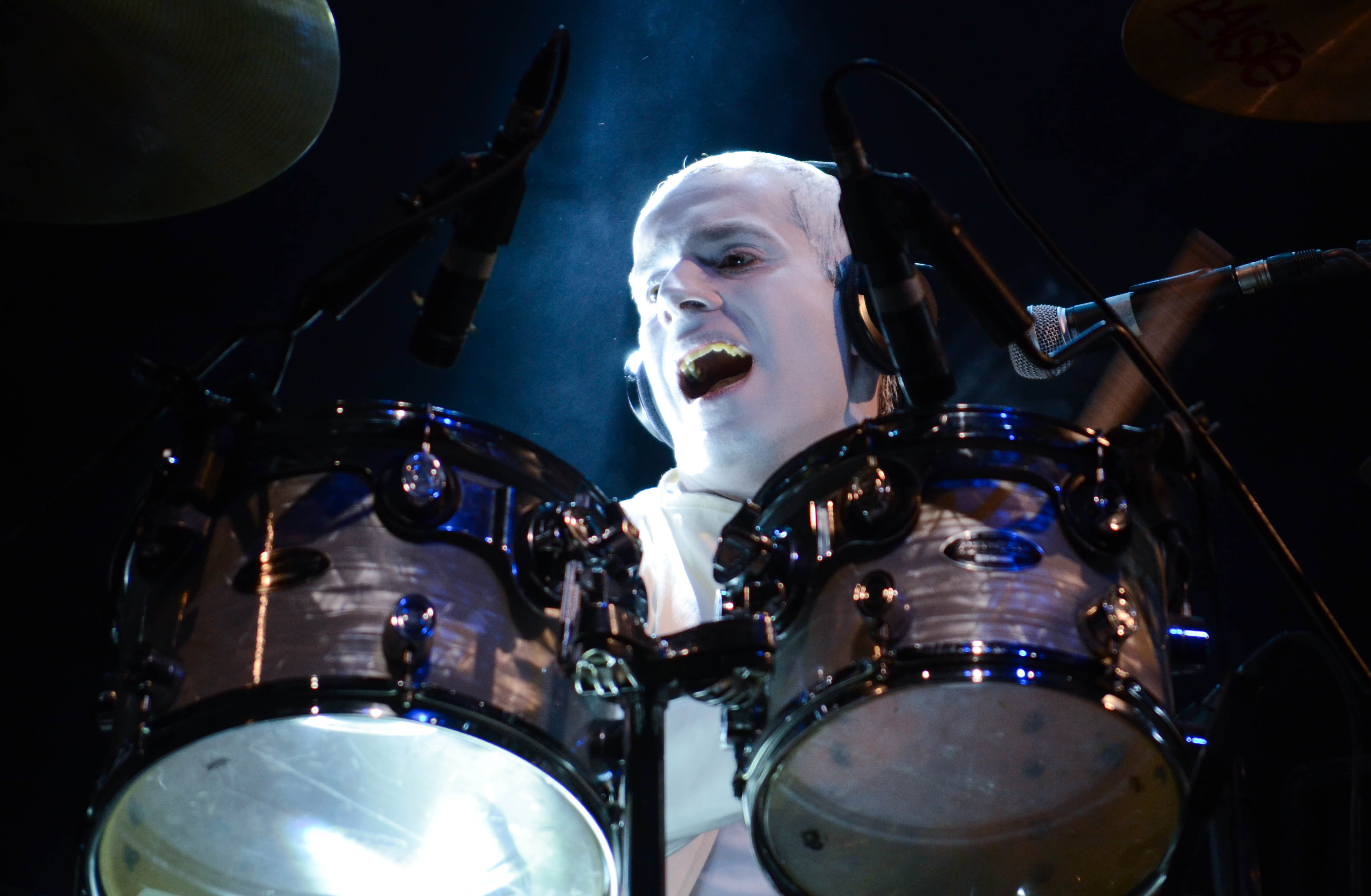 Ricardo "Pepo" Cortés: baterista y corista de Sig Ragga, banda argentina de reggae fusión formada en la ciudad de Santa Fe